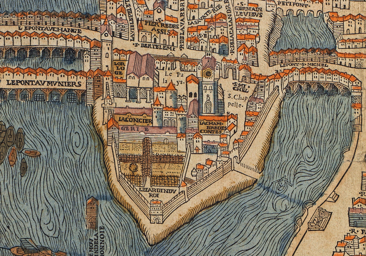 Palais de la Cité - Extrait du plan Truschet et Hoyau, 1550